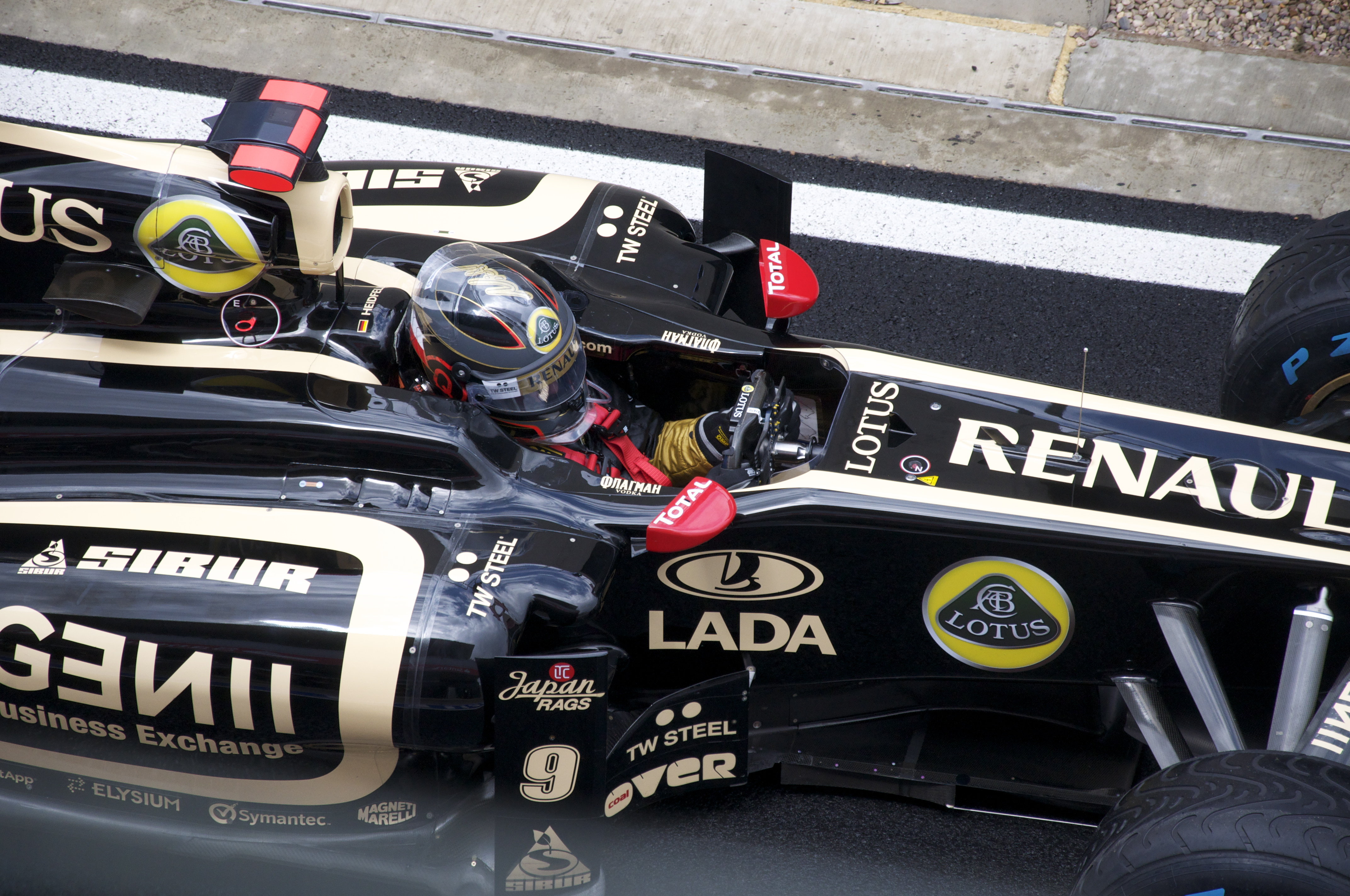 Heidfeld silverstone 2011